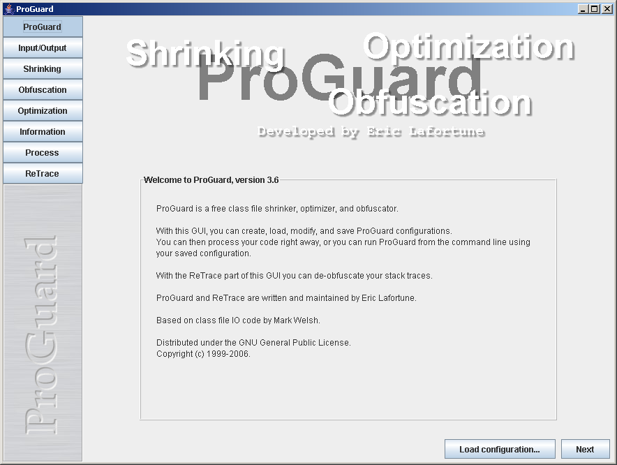 Screenshot ProGuard 3.6